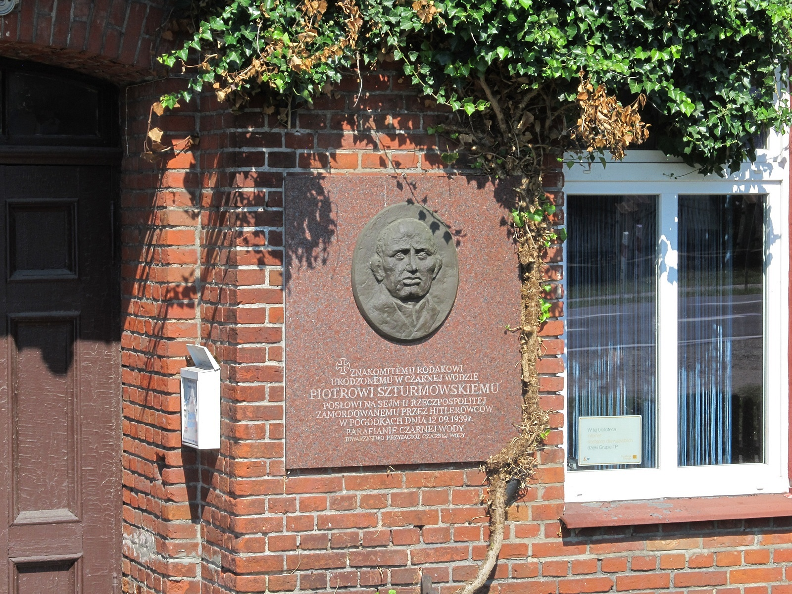 Poseł na Sejm w latach 1922/1935 - Piotr Szturmowski